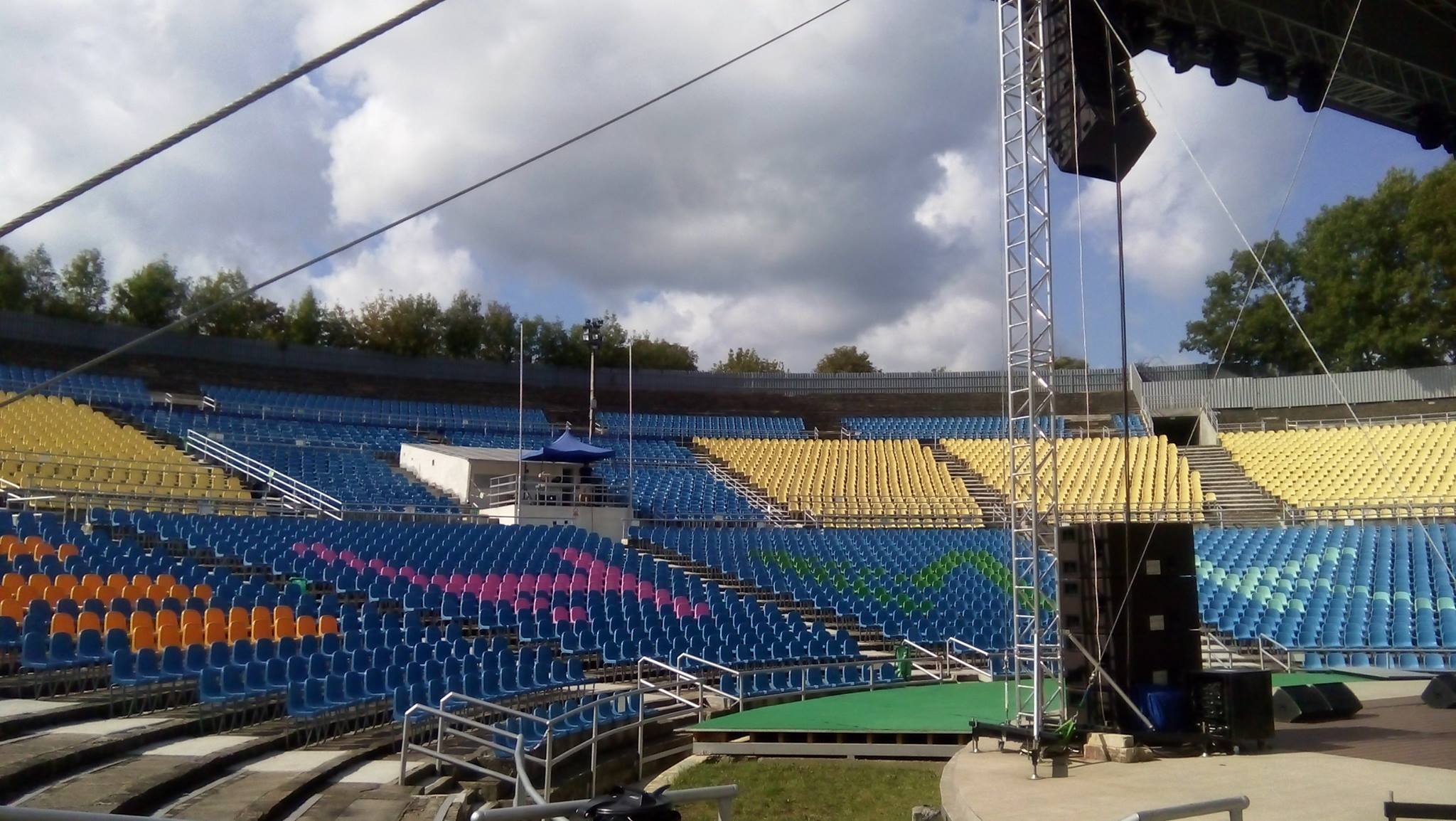 Hľadisko - EHMK